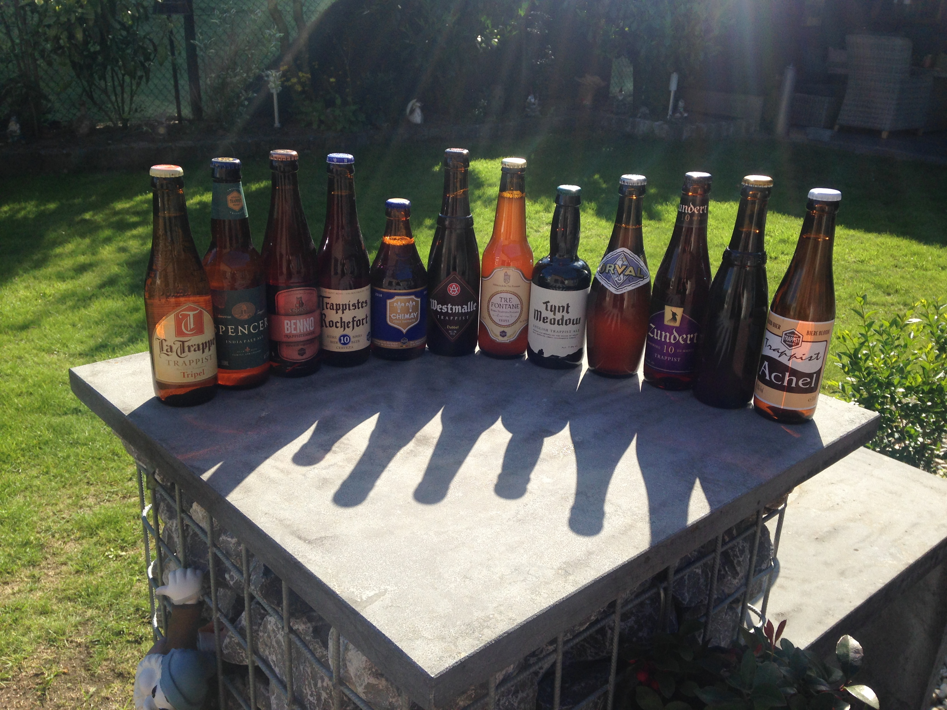 Alle 12 erkende trappistenbieren (mei 2019).